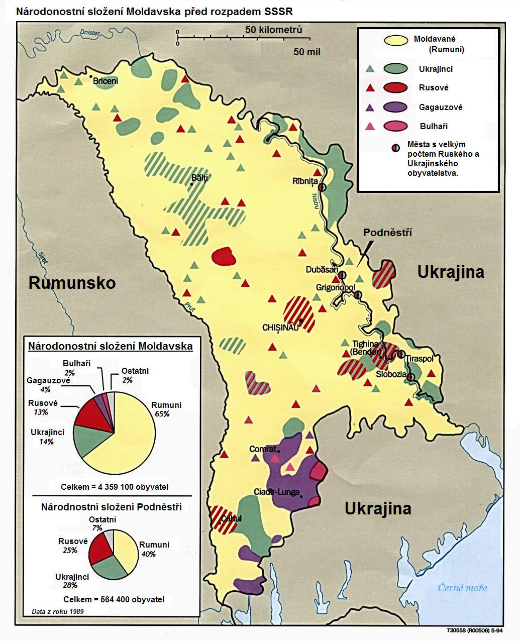 Mapa národnostního složení Moldavska před rozpadem SSSR.